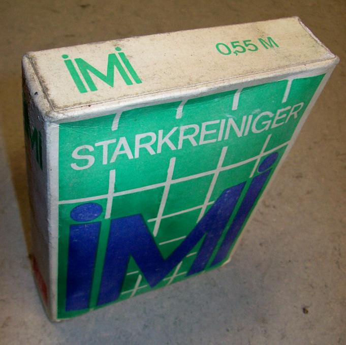 IMI-Waschpulver